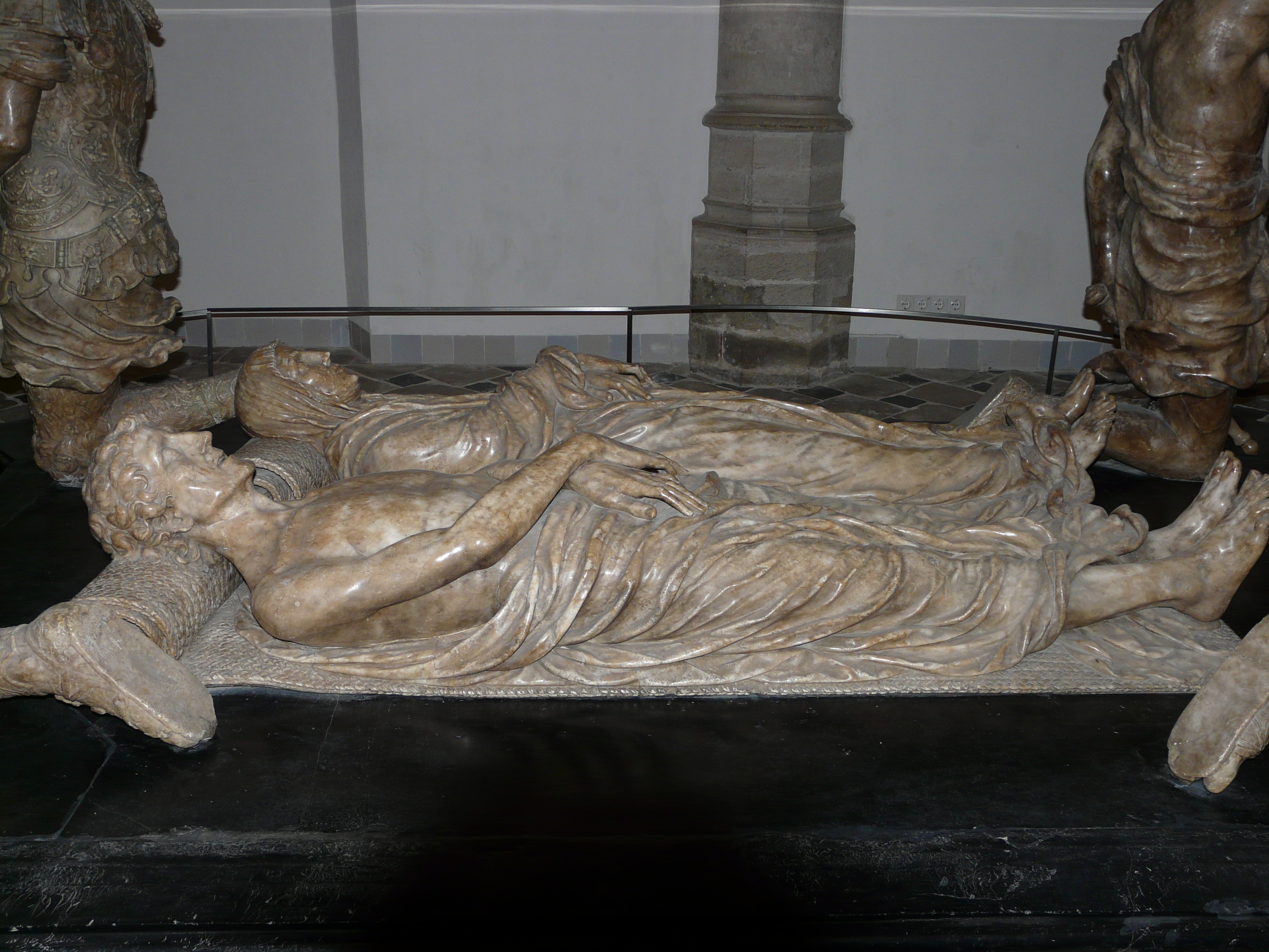 Praalgraf van Engelbrecht II van Nassau in de Grote Kerk in Breda Centrum